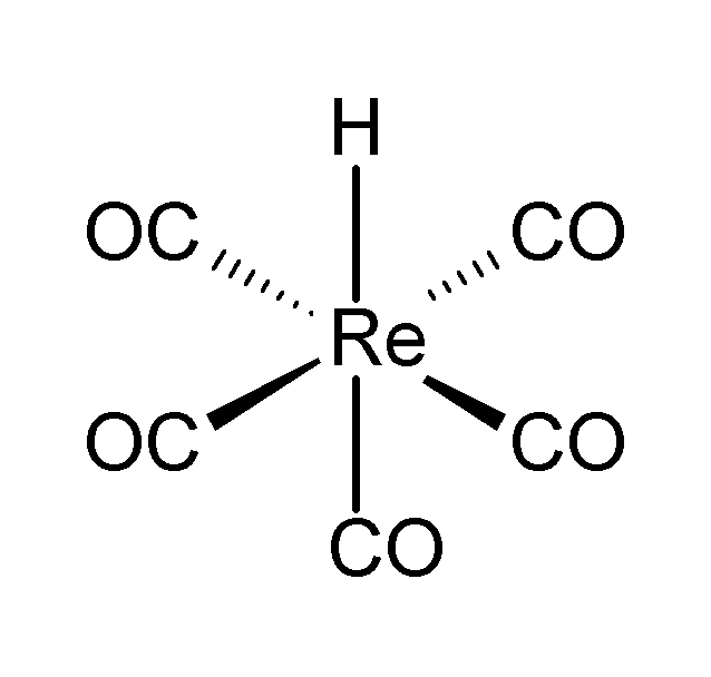 Pentacarbonylhydridorhenium